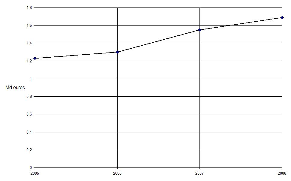 Chiffre d'affaires de Giesecke & Devrient